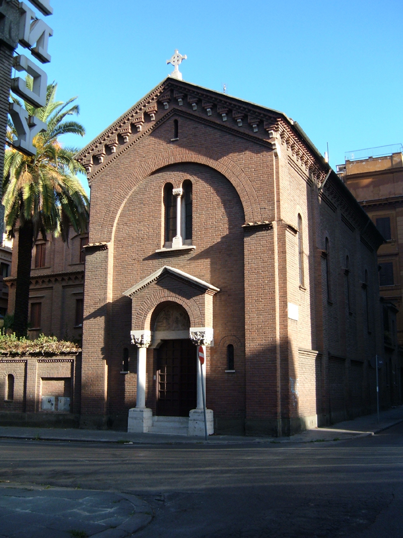 Chiesa di Santa Maria Regina dei Cuori, a Roma, nel rione Ludovisi.